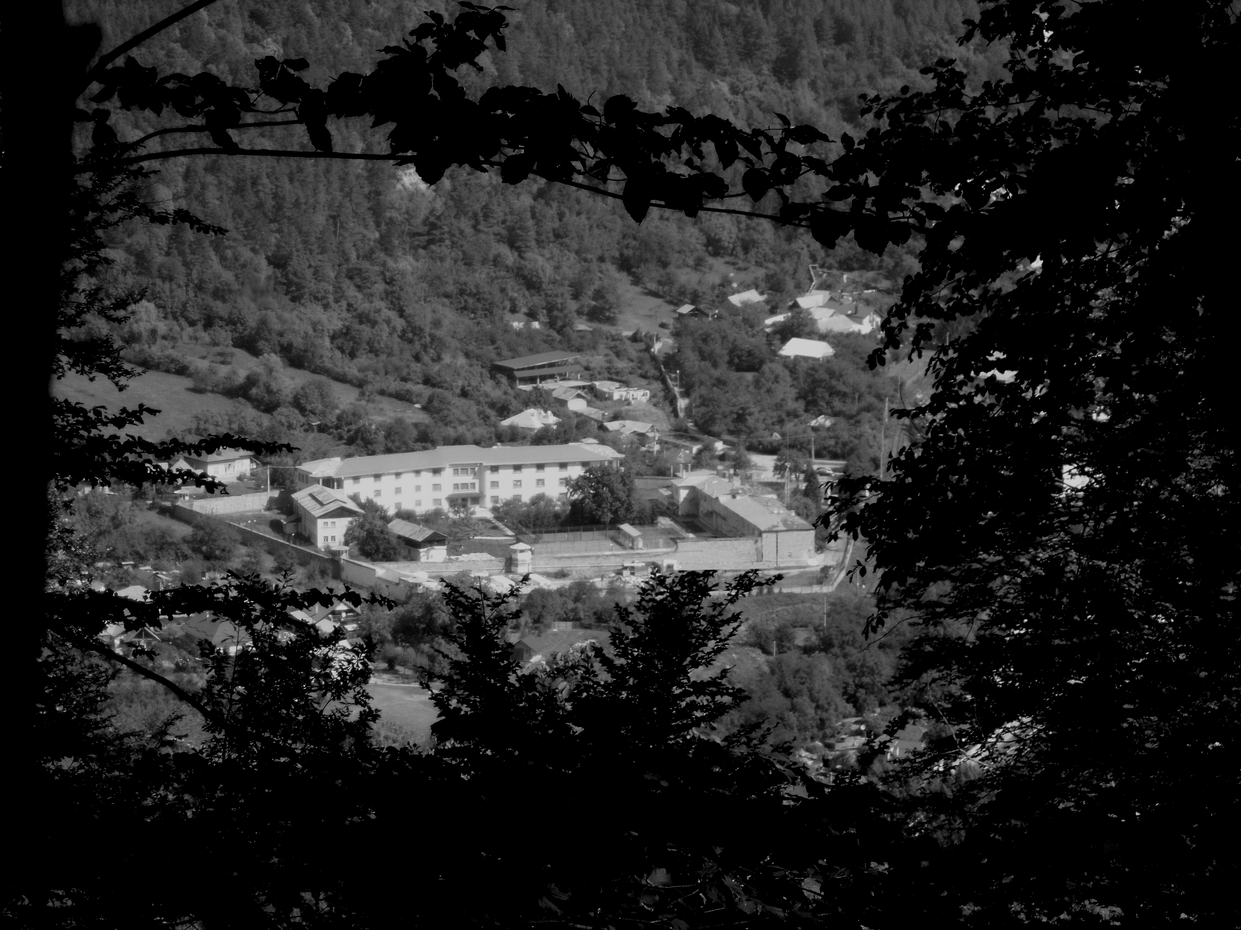 Penitenciarul-Spital Târgu Ocna văzut de la circa 1 km distanță. Lumină și contrast modificate în GIMP 2. De asemenea a fost folosită unealta CloneTool pentru a elimina crengile copacilor din mijlocul cadrului și de a ascunde unele detalii. Fotografia a fost modificată astfel încât să nu prezinte toate detaliile din realitate. Crengile de la bază ascund garajele. Fotografia are scop educațional, folosirea ei în alte scopuri este strict interzisă și reglementată de legislația românească în vigoare, vezi Terms of Use: Meta has a page about this at: TOU Licența este Creative Commons Atribuire și distribuire în condiții identice 4.0 Internațională, pentru mai multe detalii derulați jos.